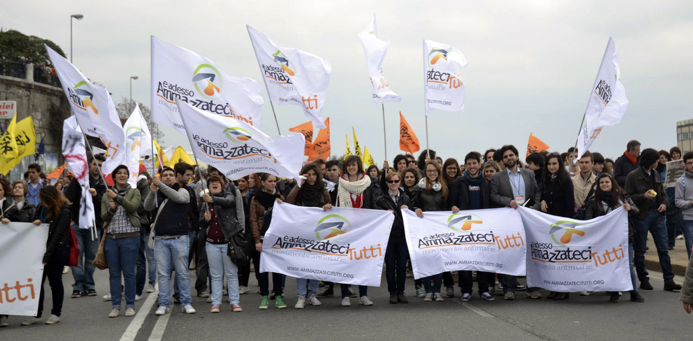 Ammazzateci Tutti in corteo